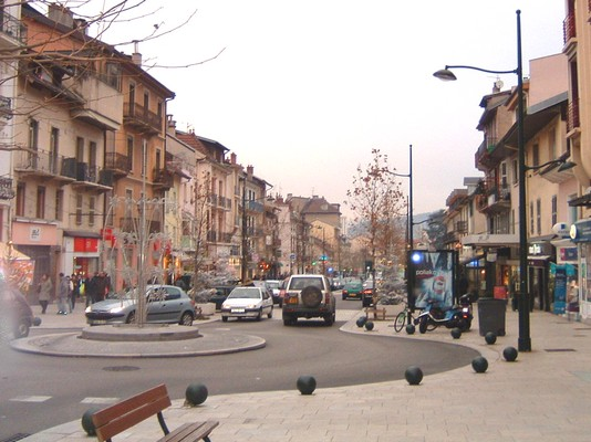 Le centre ville de la commune d'Aix-les-Bains en France dans le département de la Savoie.